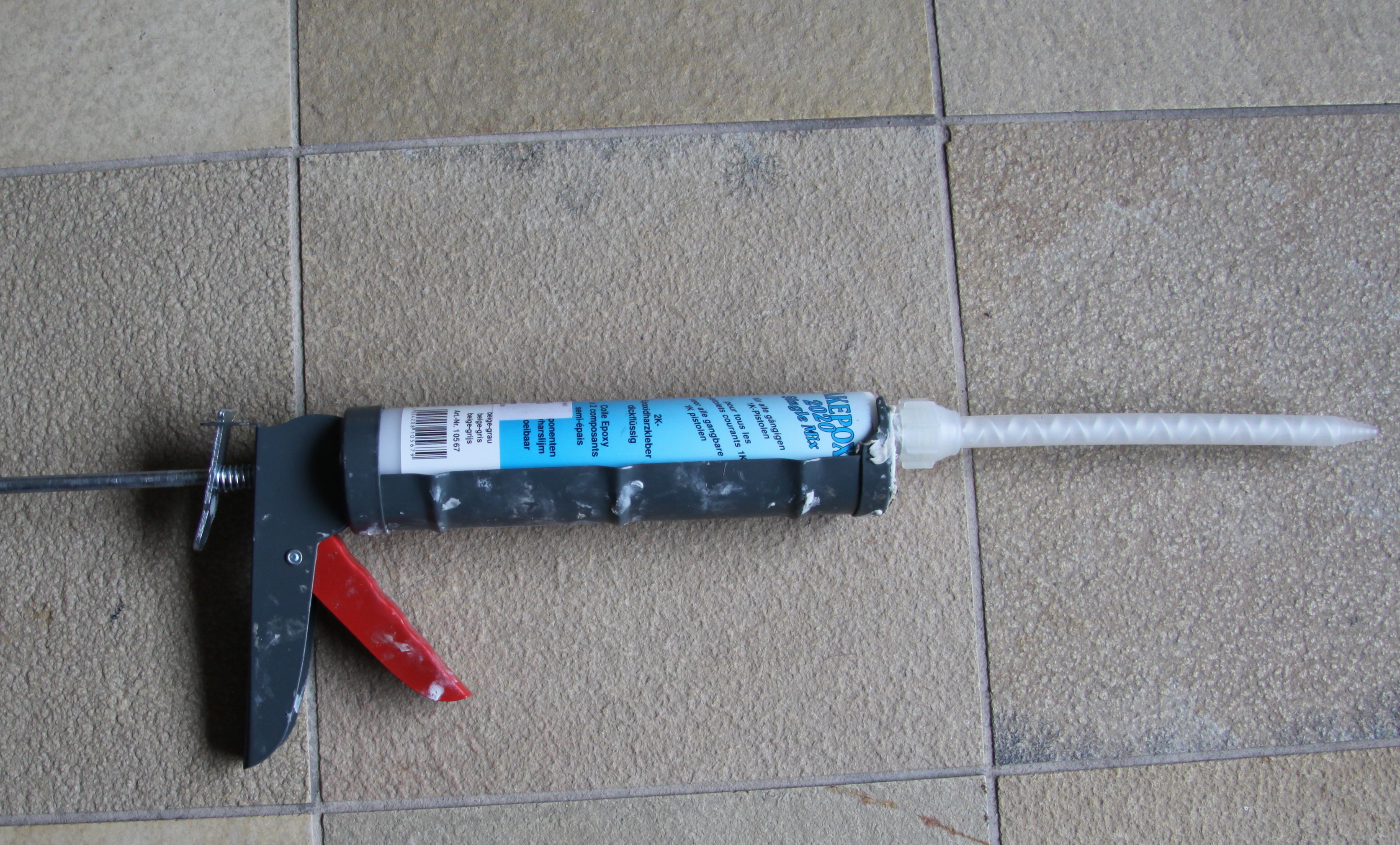 Dieses Arbeitsgerät mischt Akepox mit einer weiteren Komponente während eines Auftrags. Es handelt sich um ein Klebesystem auf der Basis von Epoxidharz.